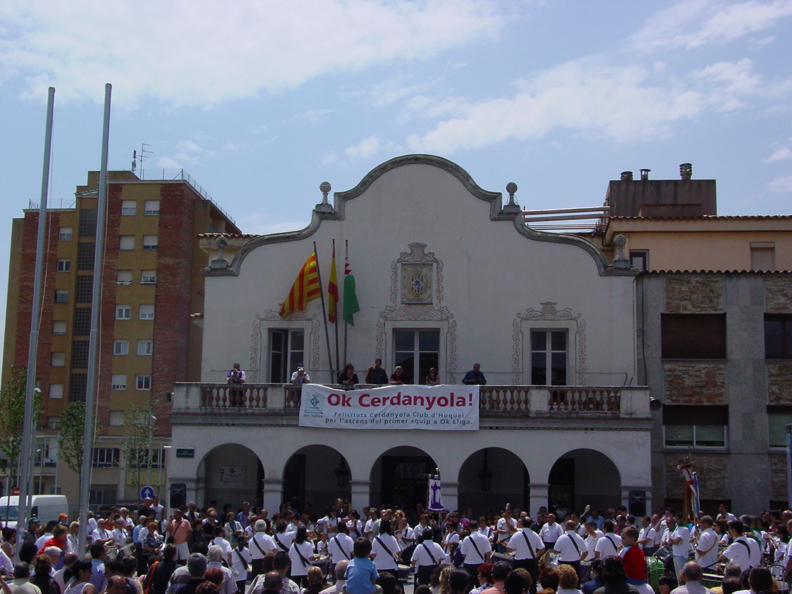 Cerdanyola Hoquei ascens 2007